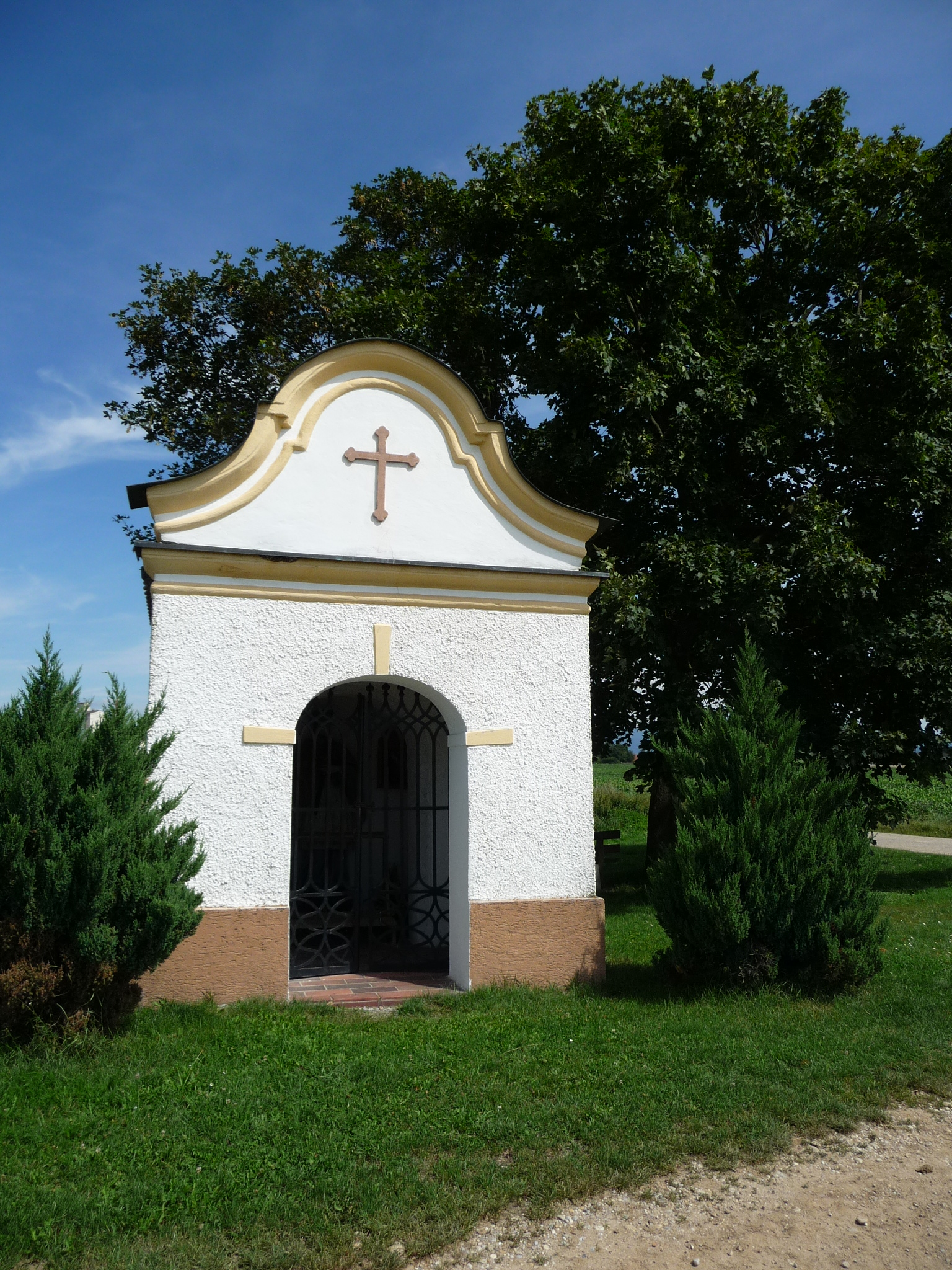 Denkmale in Aholming